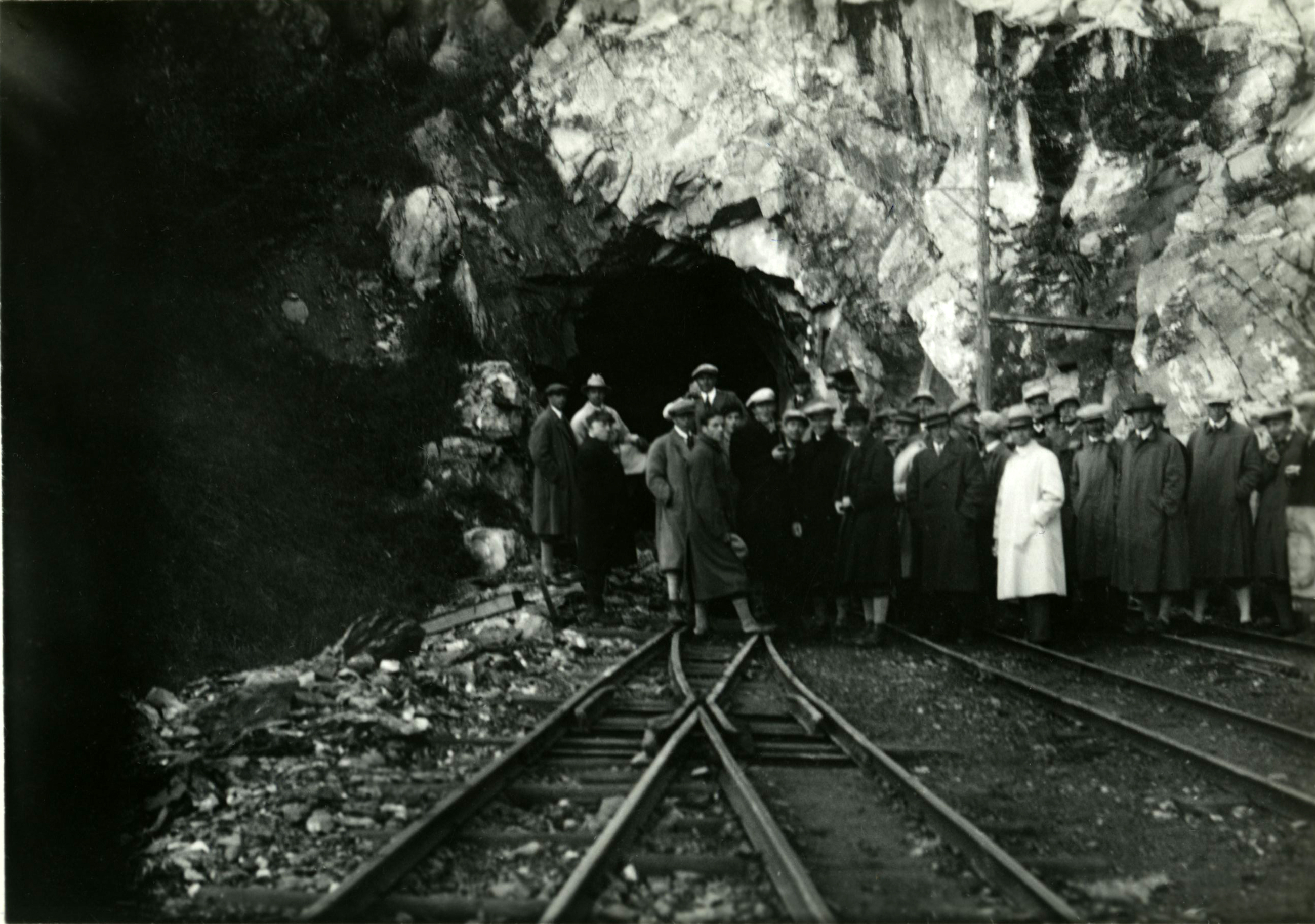 Format: Fotopositiv. Foto: Eirik Sundvor (1902 - 1992). År: 1931.